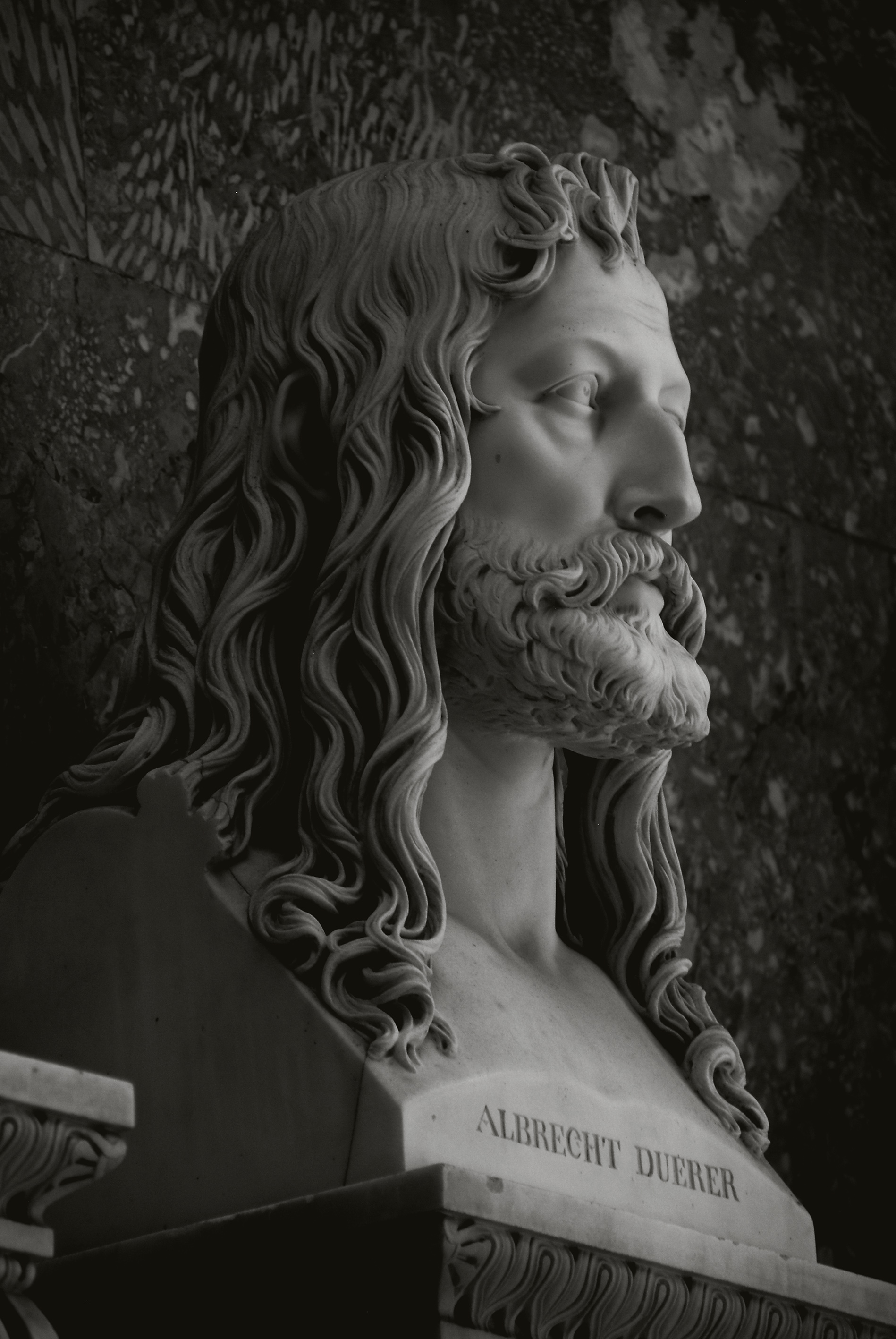 Büste von Albrecht Dürer in der Walhalla